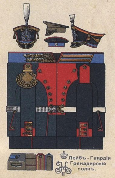 Форма обмундирования парадная лейб-гвардии Гренадерского полка. 1910 год.